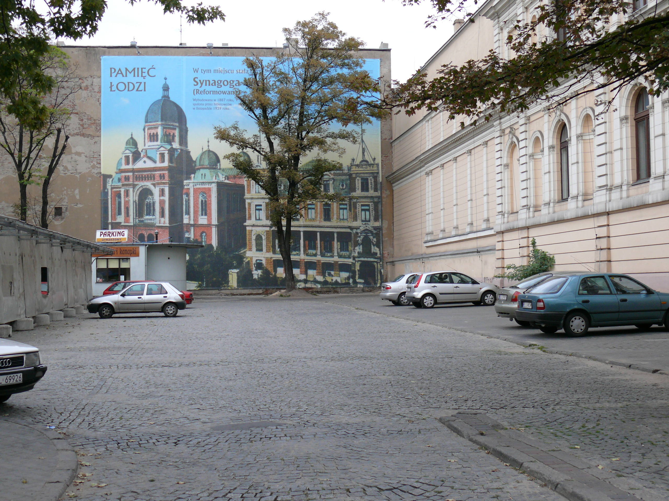 "Pamięć Łodzi" banner upamiętniający zniszczoną Wielką Synagogę w Łodzi